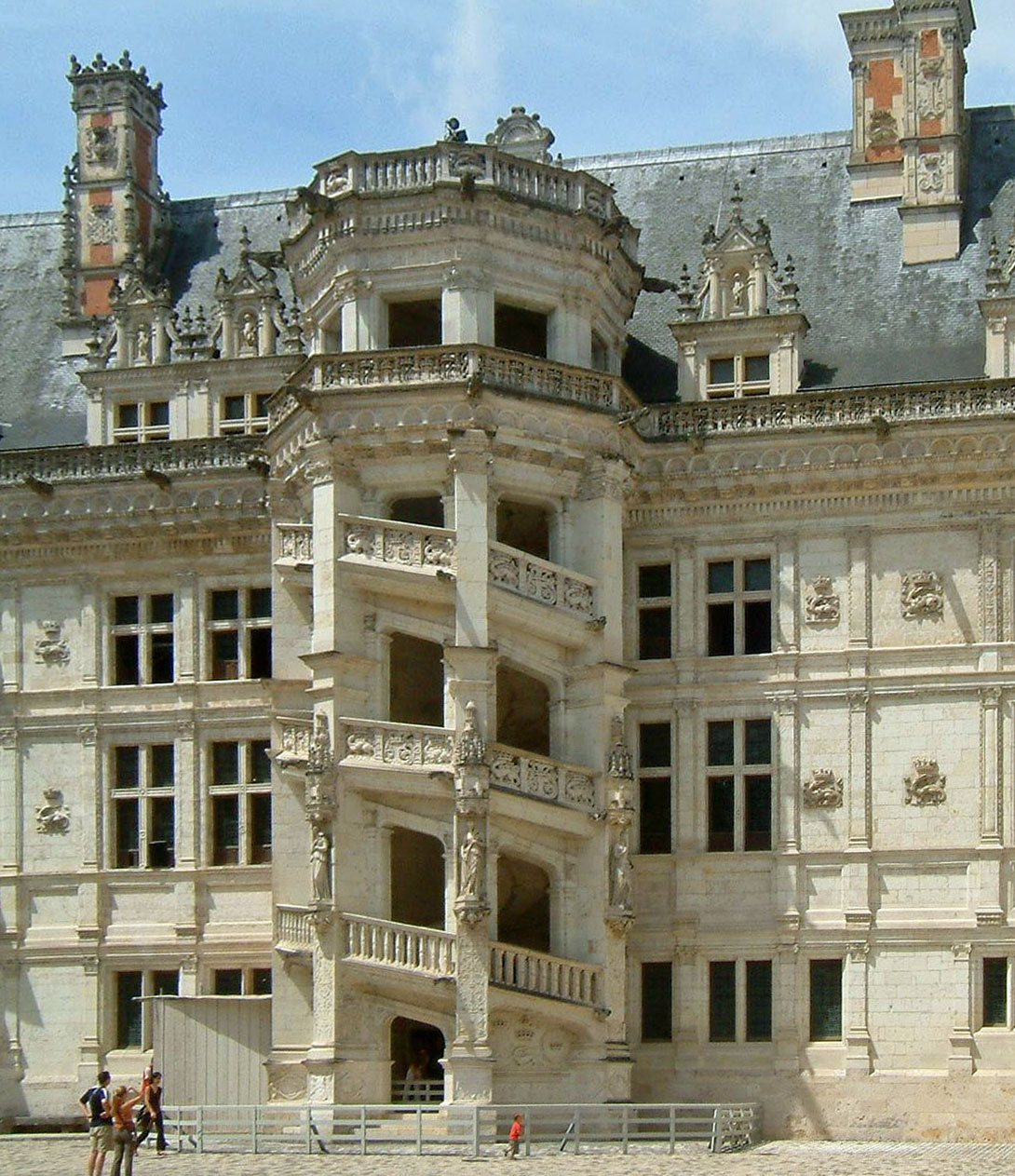 Château de Blois, Blois, FRANCE